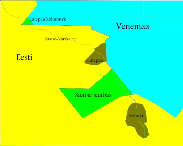 Saatse saapa asukohaskeem Eesti ja Venemaa piiril. Aluseks andmed Õhtulehe analoogselt skeemilt, 13. veebruar 2014, lk 6-7.